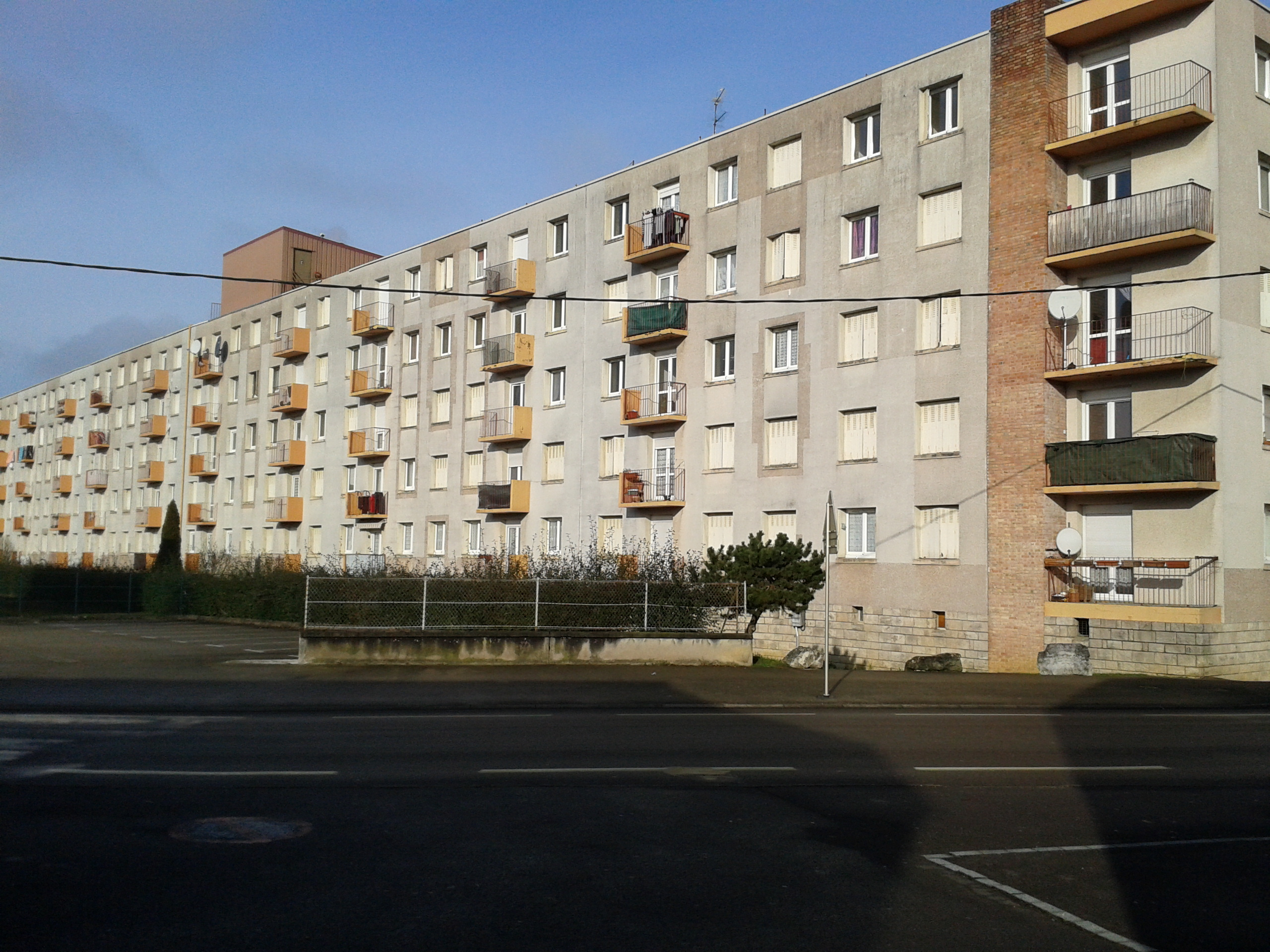 L'immeuble Coubertin de Vesoul